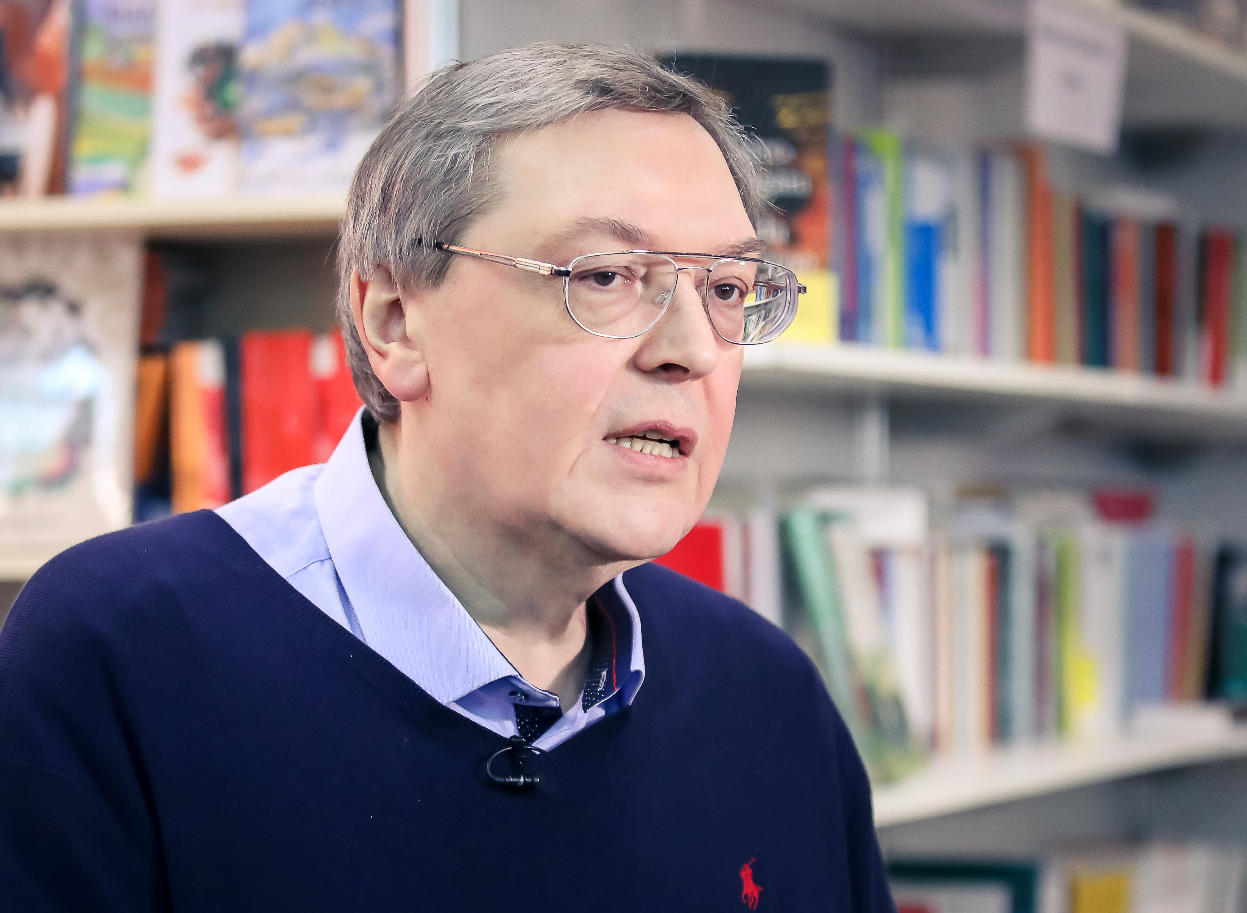 Иван Никитич Толстой- российский филолог, телеведущий. Non/fiction 2018